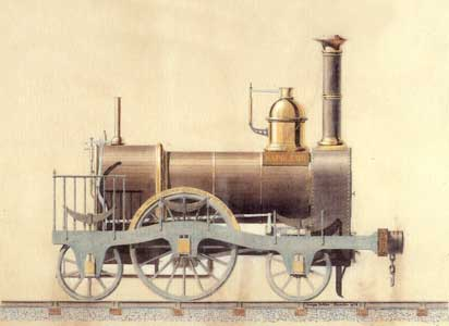 Première locomotive André Koechlin & Cie.